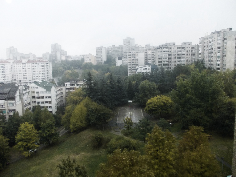 Насеље Браће Јерковић